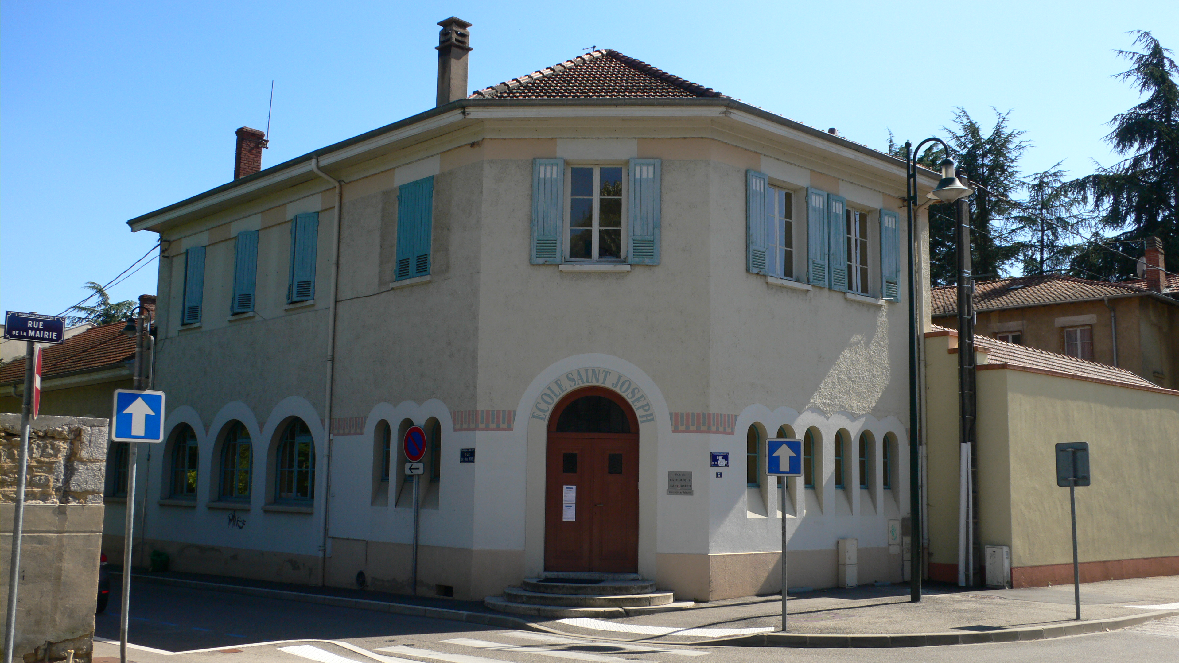 Champagne-au-Mont-d'Or - L'école Saint-Joseph